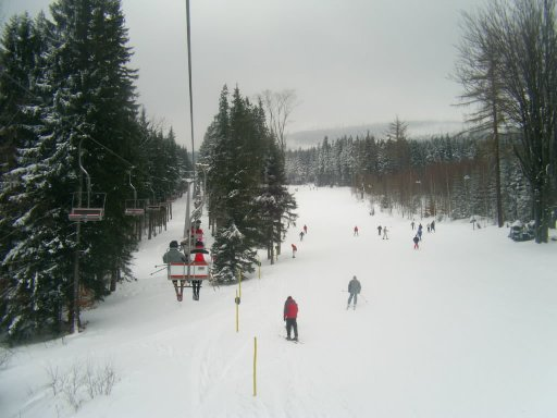 Kolej linowa na Szrenicę w Szklarskiej Porębie